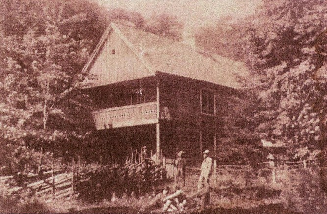 Grevestuen på Mellom Bolærne, Nøtterøy